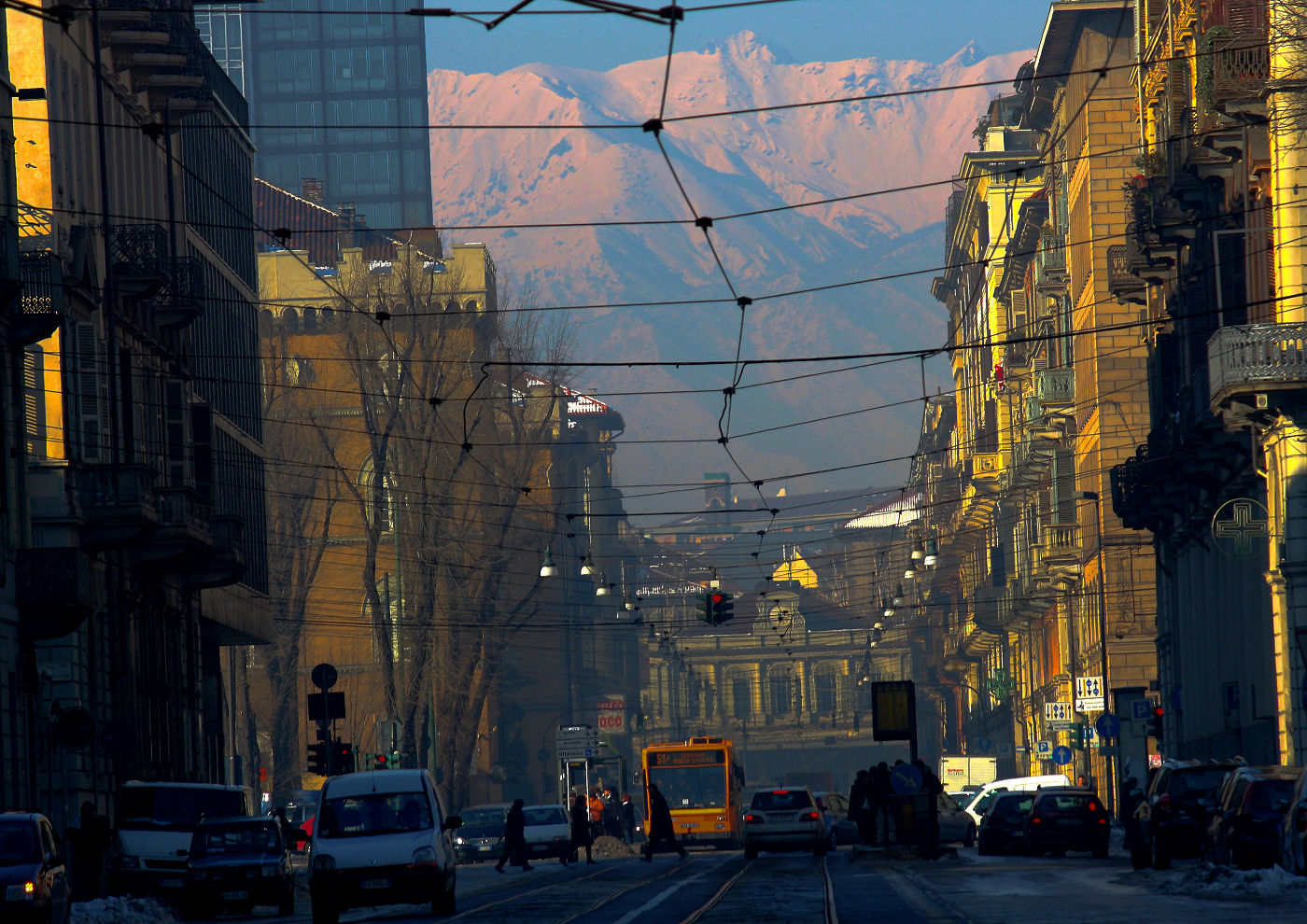 Nella foto via Cernaia e la stazione di Porta Susa, Torino - Italia.